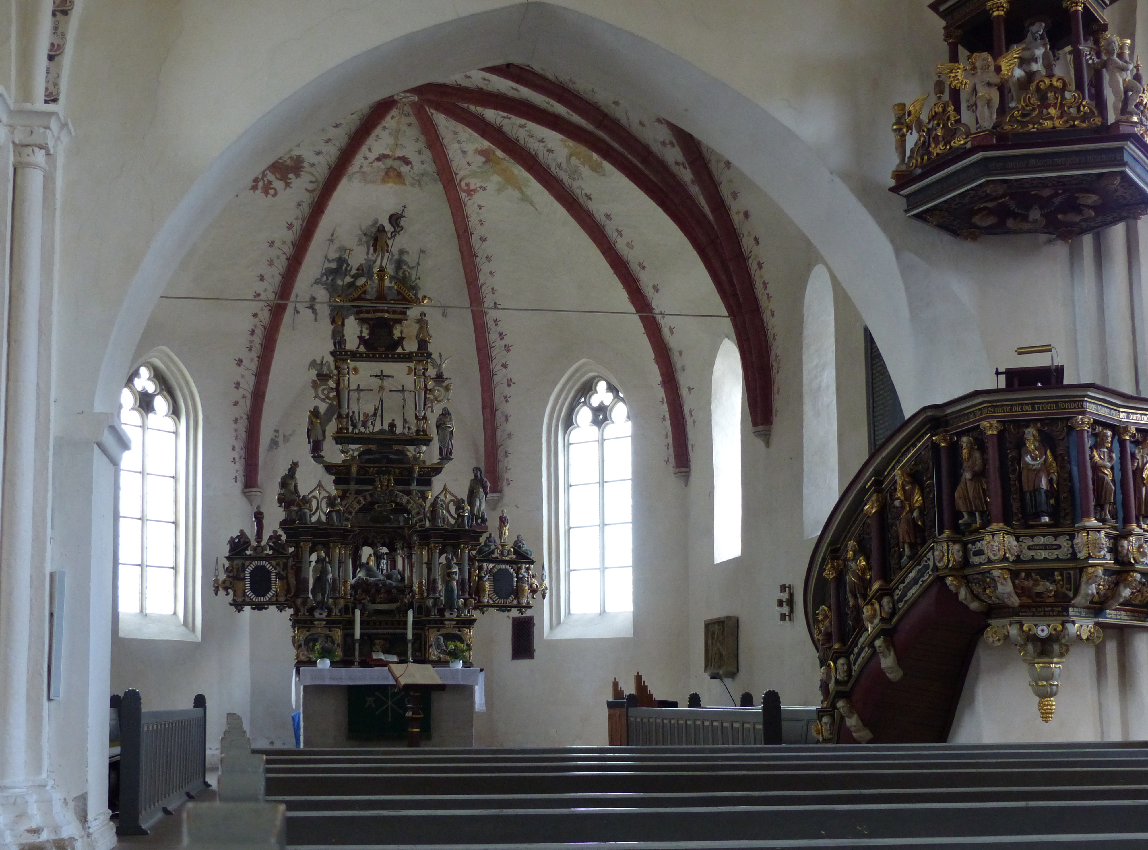 Chor und Kanzel der St.-Aegidius-Kirche in Berne